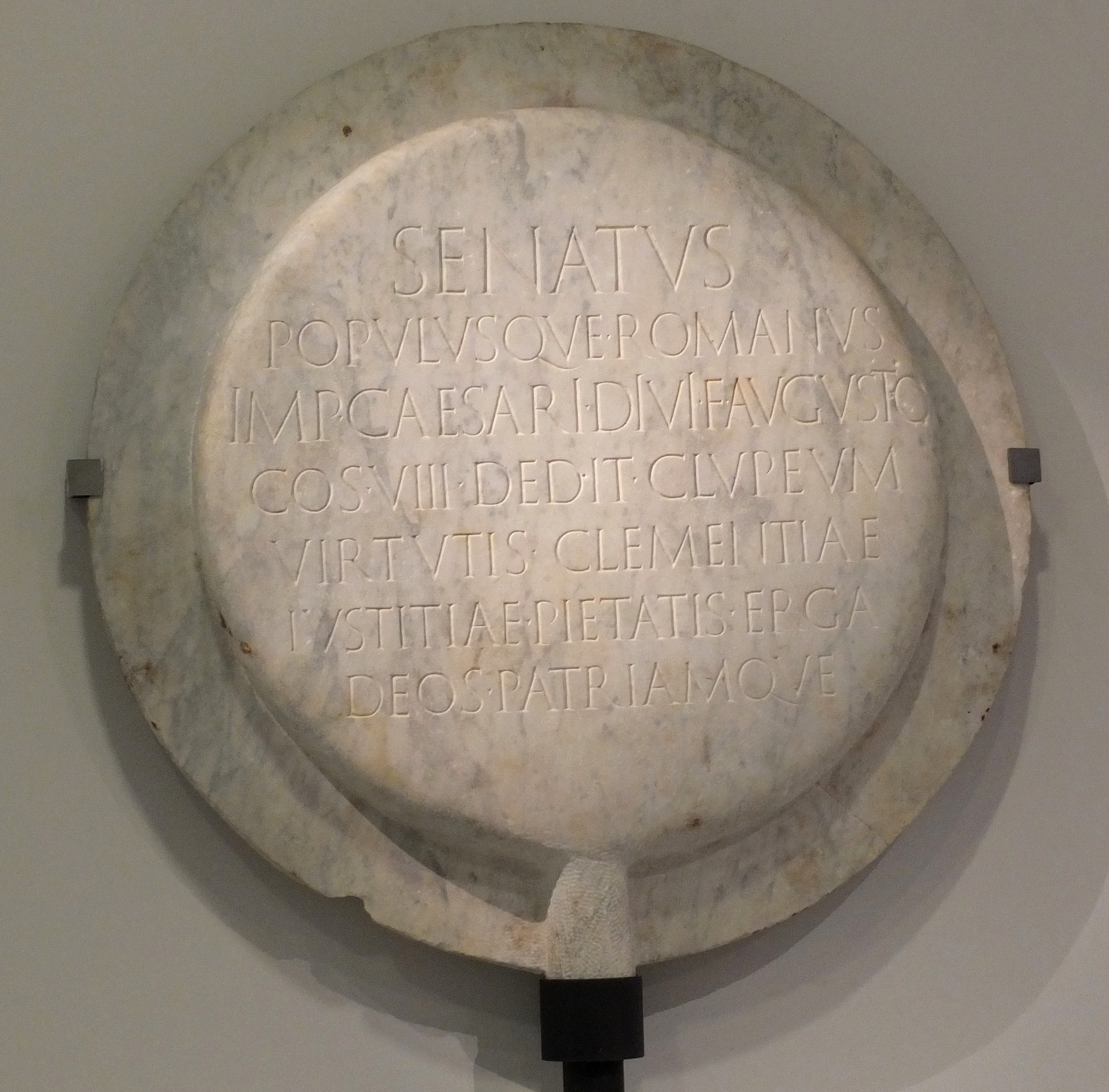 Clipeus Virtutis. Copie en marbre de Carrare du bouclier d'honneur décerné à Auguste par le Sénat en 26 av. J.-C. H 1,10m. Découvert en 1951 dans le cryptoportique du forum d'Arles. Musée de l'Arles et de la Provence antiques, N° inventaire CRY 51 00 95. Présenté lors de l'exposition Moi, Auguste, Empereur de Rome, 19 Mars 2014 - 13 Juillet 2014, Grand Palais, Paris.